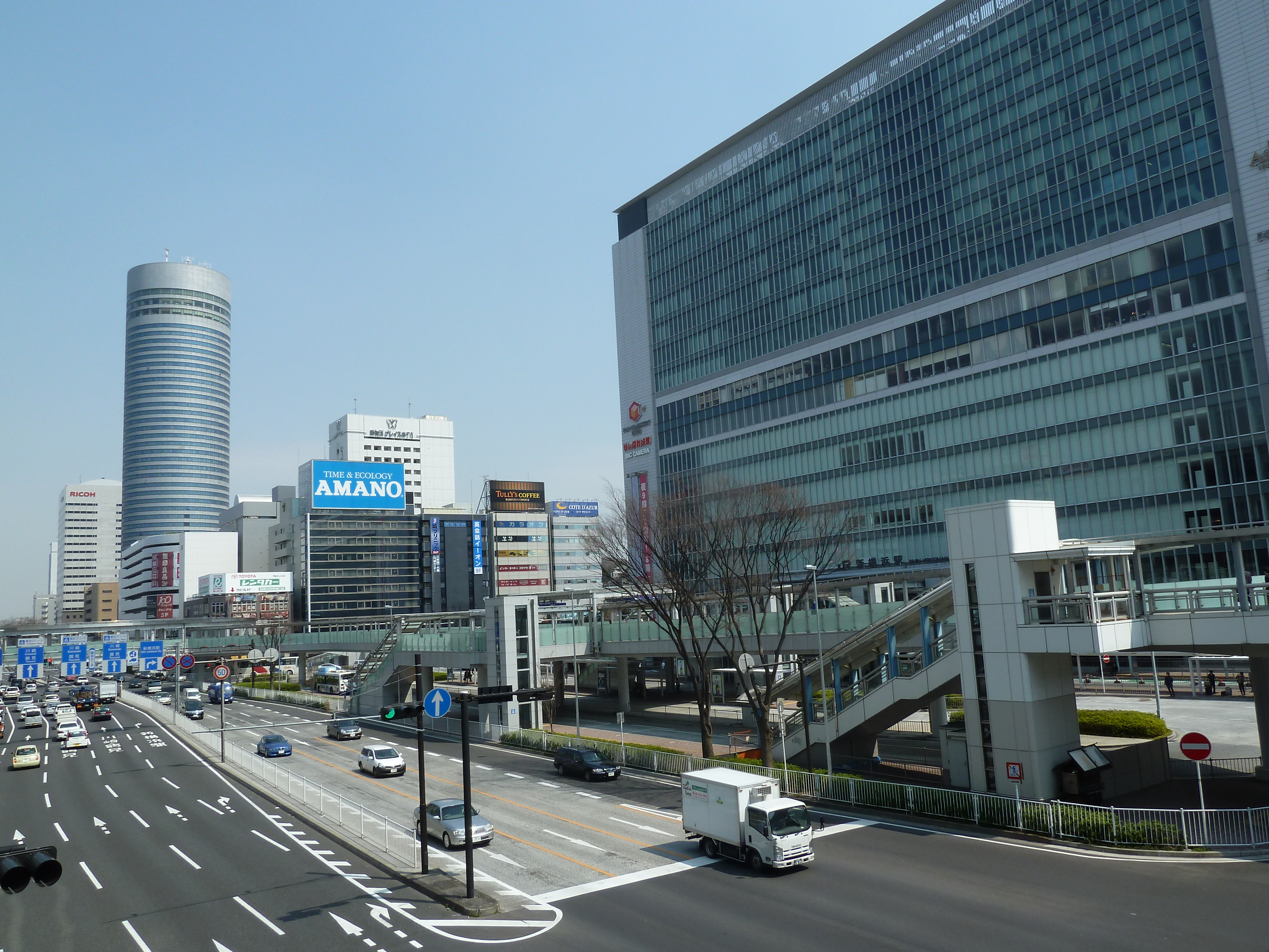 新横浜駅前風景